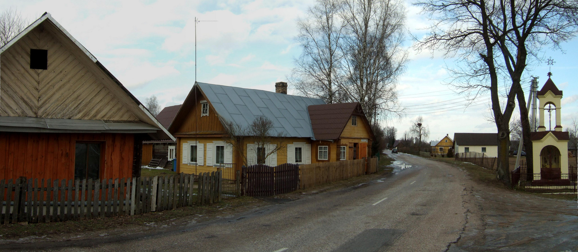 Dargužių kaimas (Varėnos raj.)